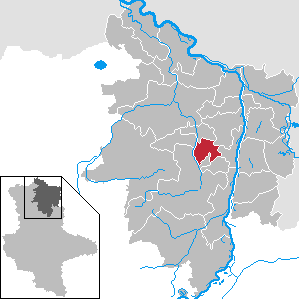 Eichstedt (Altmark) im Landkreis Stendal, Sachsen-Anhalt